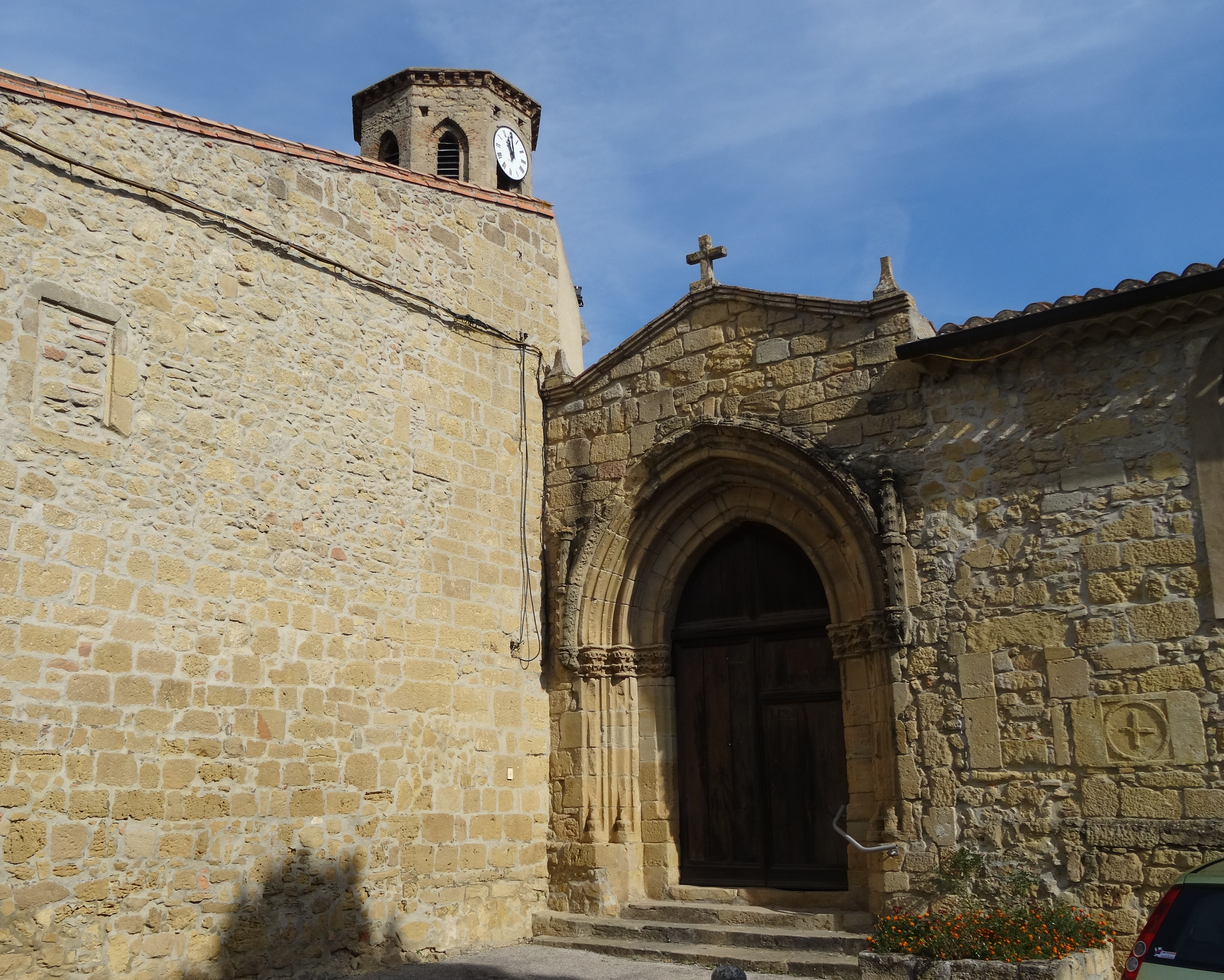 Eglise Porche d'entrée .